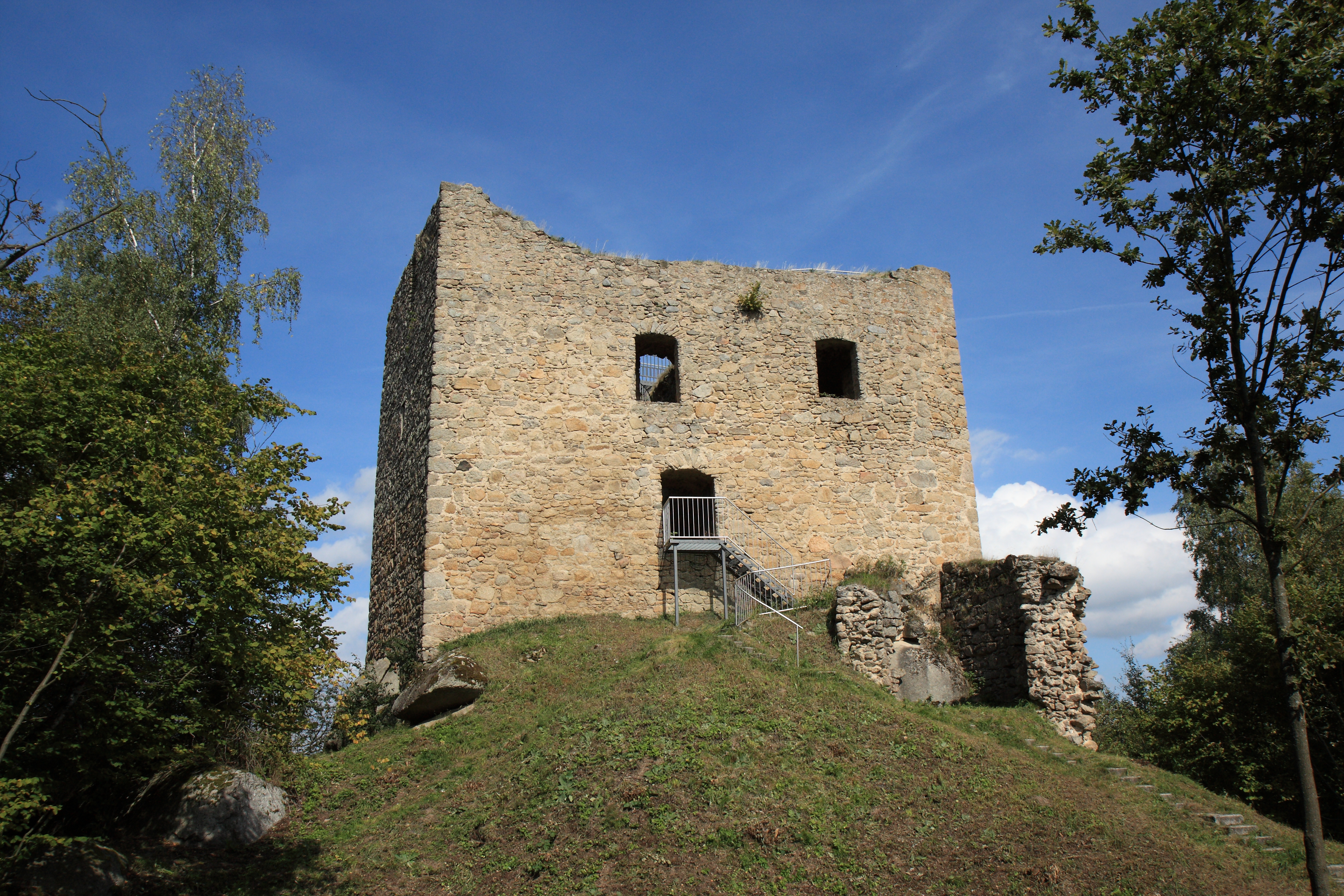 Die Südseite des Wohnturmes der Ruine Lobenstein